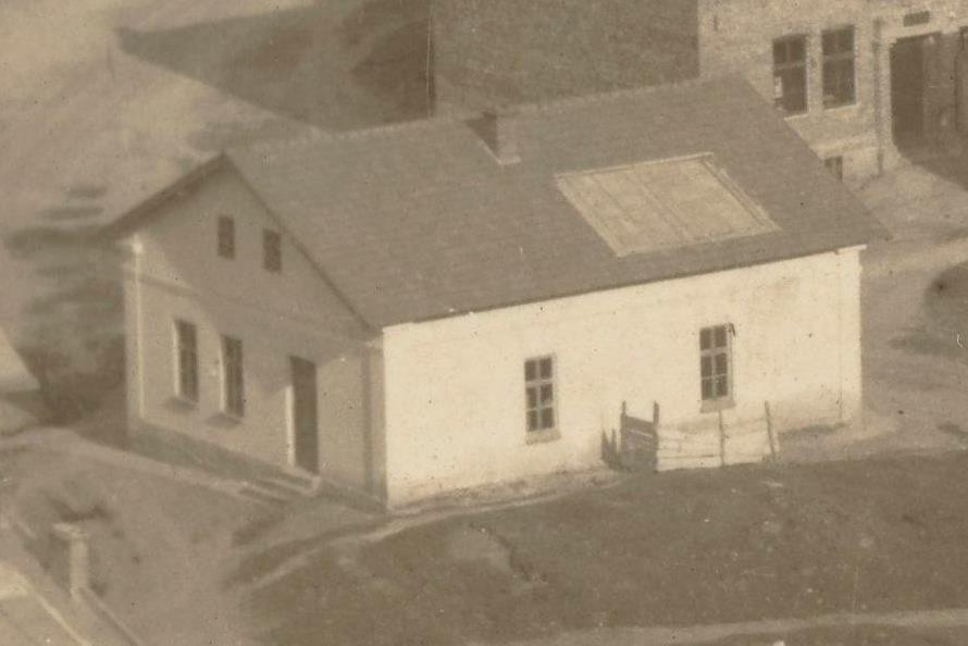 Синагога Гуятинер клойз в Теребовлі, особливостю її був дах, що відкривавася для сукки у свято Суккот, жіноче відділення було розташовано також на пешому поверсі.